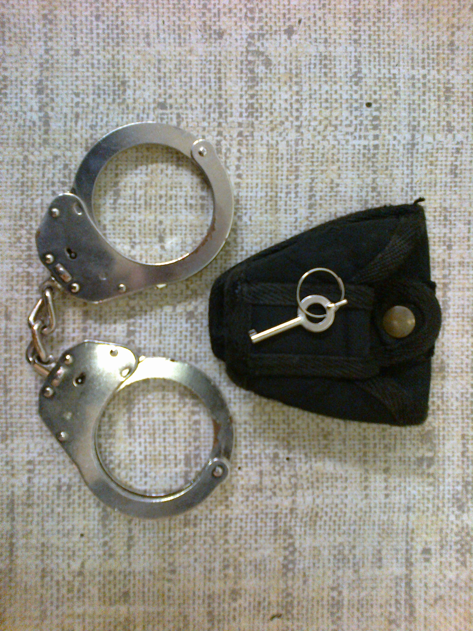 Kajdanki wraz z kaburą i kluczykiem używane w Polsce